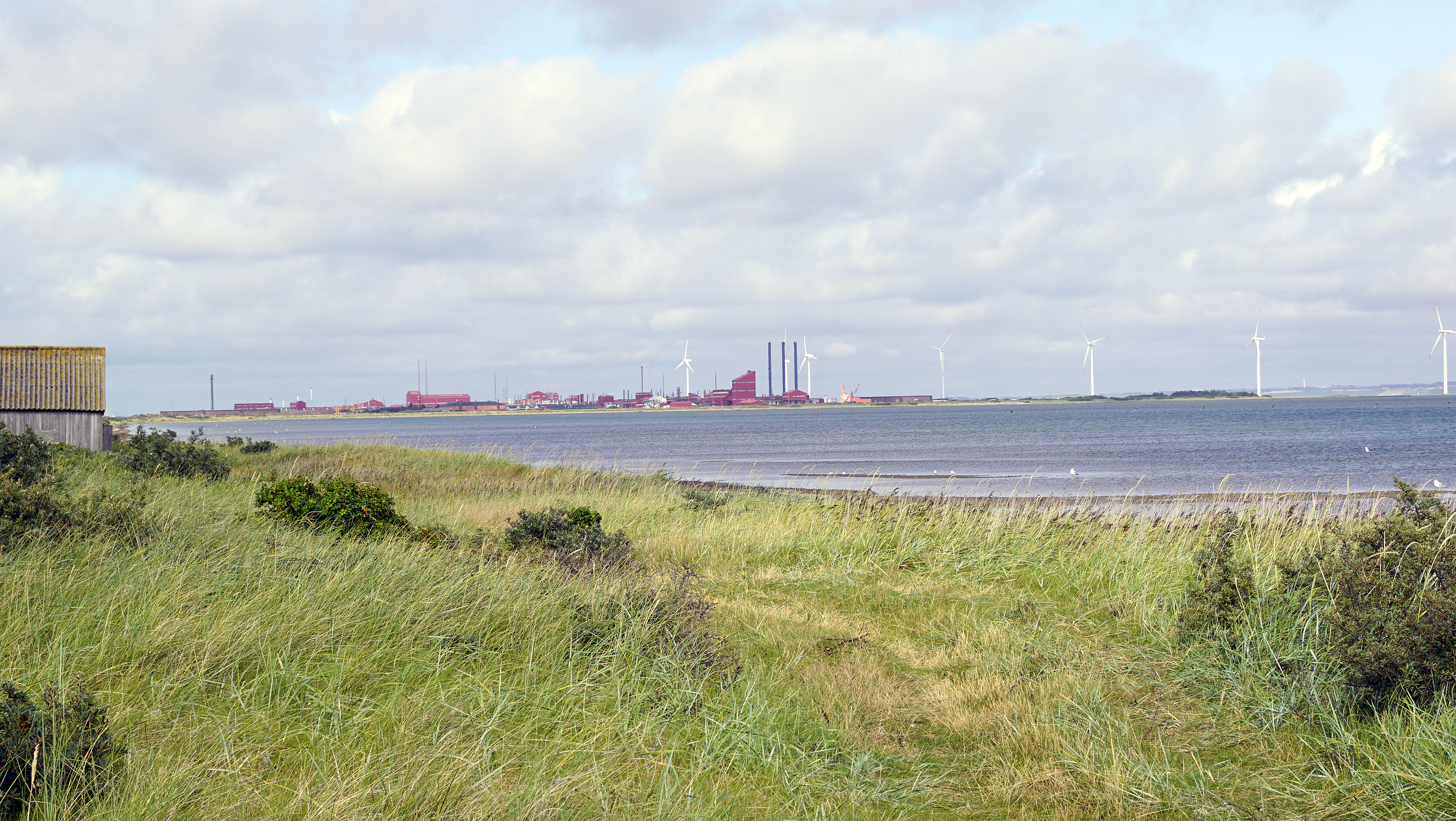 Limfjorden ved sydenden af Harboøre Tange, med Cheminova i baggrunden